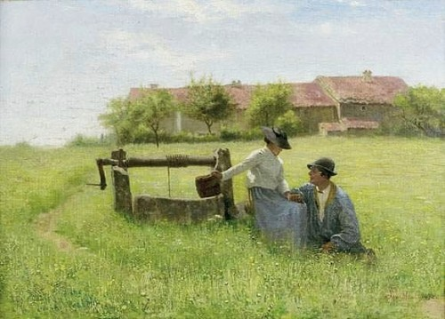 Amoureux près du puits